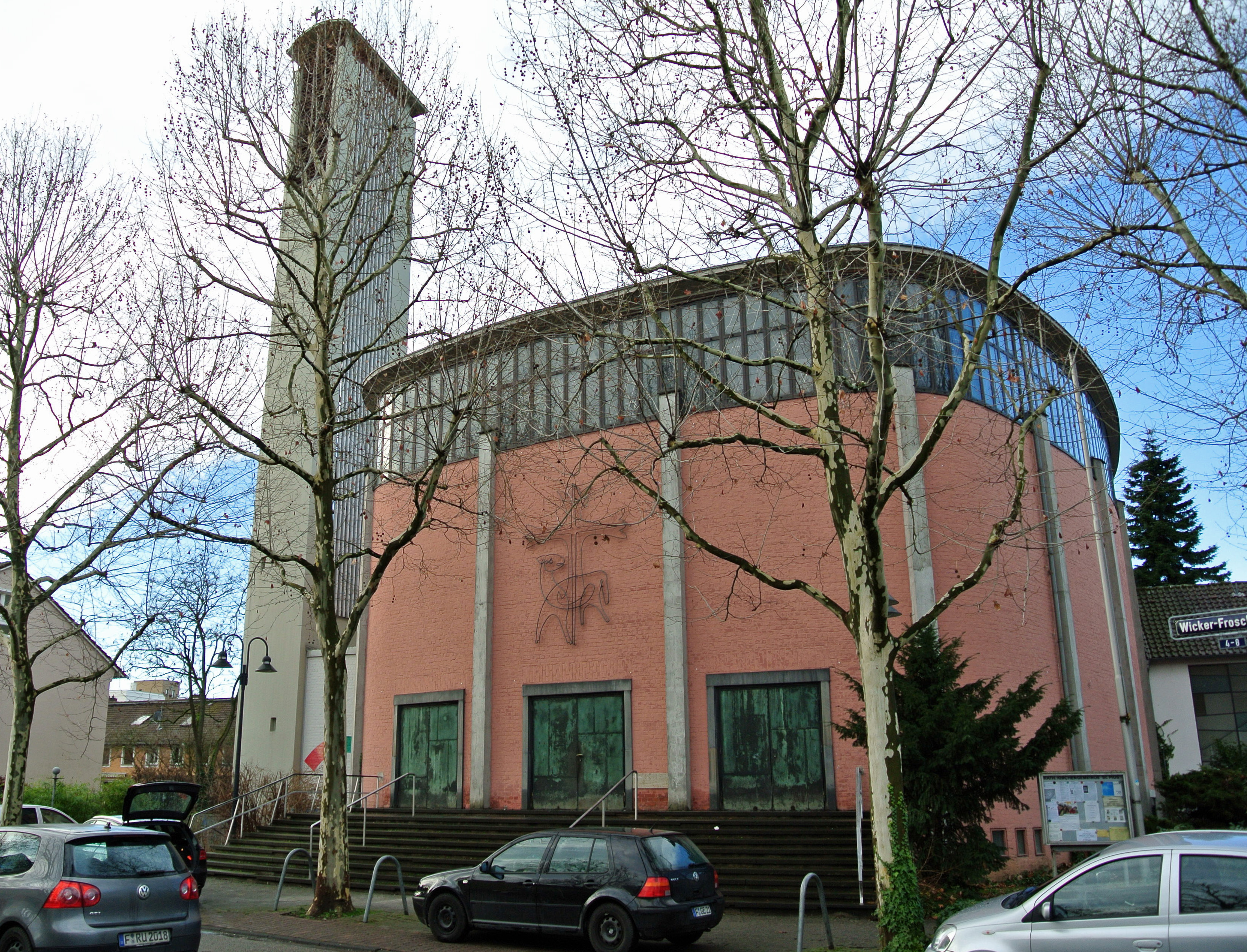 Katholische St.-Pius-Kirche in Frankfurt-Bockenheim, Kuhwaldsiedlung, Philipp-Fleck-Straße 13, Baujahr: 1957, Architekten: Walter Nicol, BDA (* 11.03.1905 Frankfurt (Main) † 31.08.1991 ebenda) und der Frankfurter Architekten Hans Busch (1911-1990)